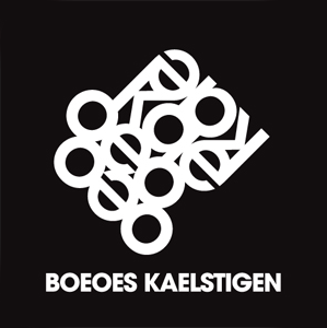 Boeoes Kaelstigen Logotype